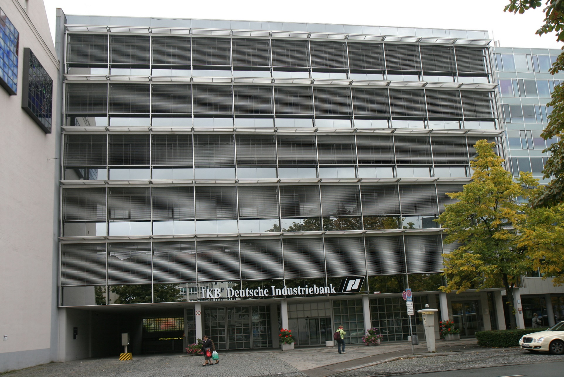 Gebäude der IKB Deutsche Industriebank Niederlassung München, Seidlstraße 27 in München.